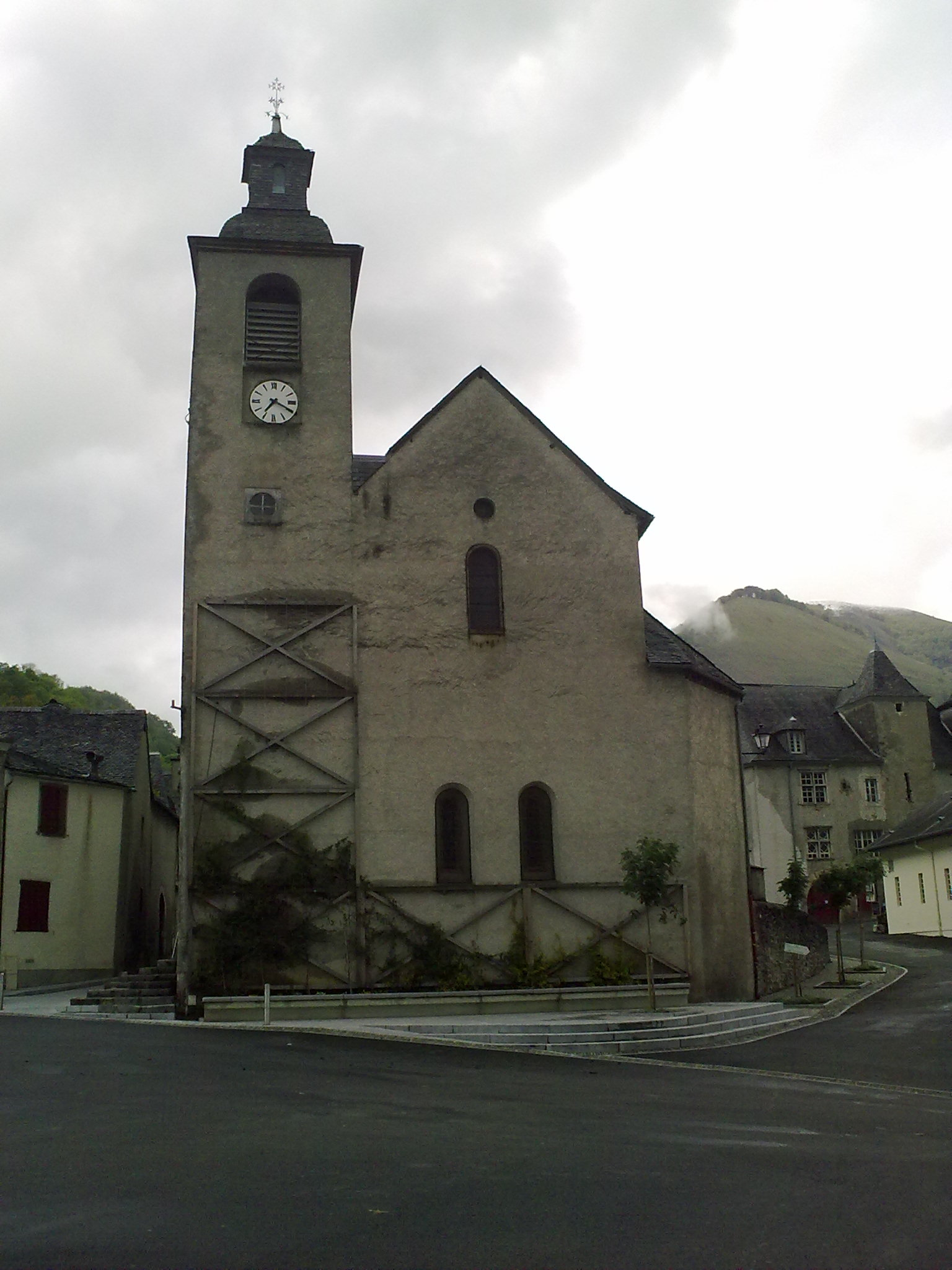 Bedous, France